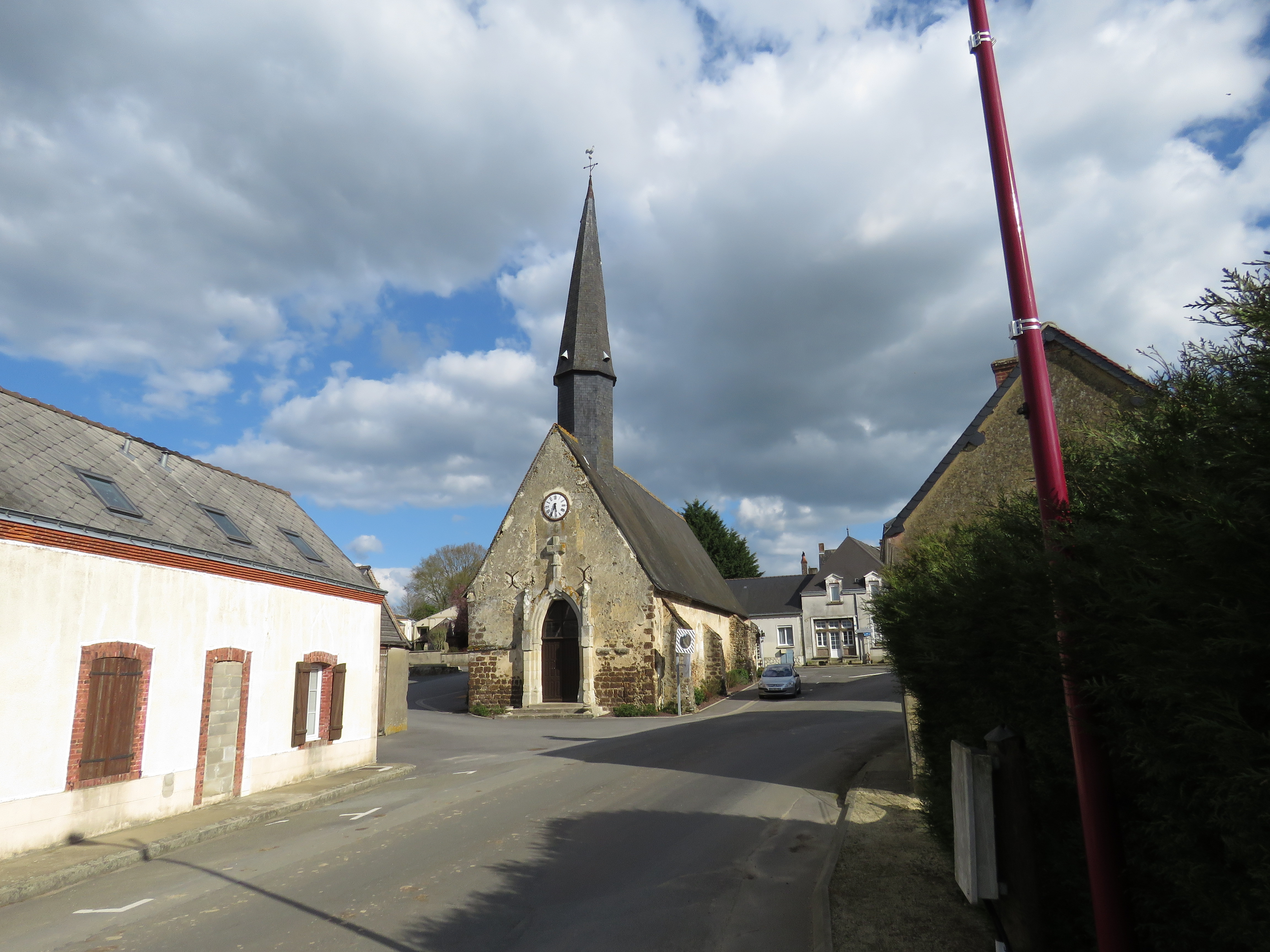 Église de Maisoncelles